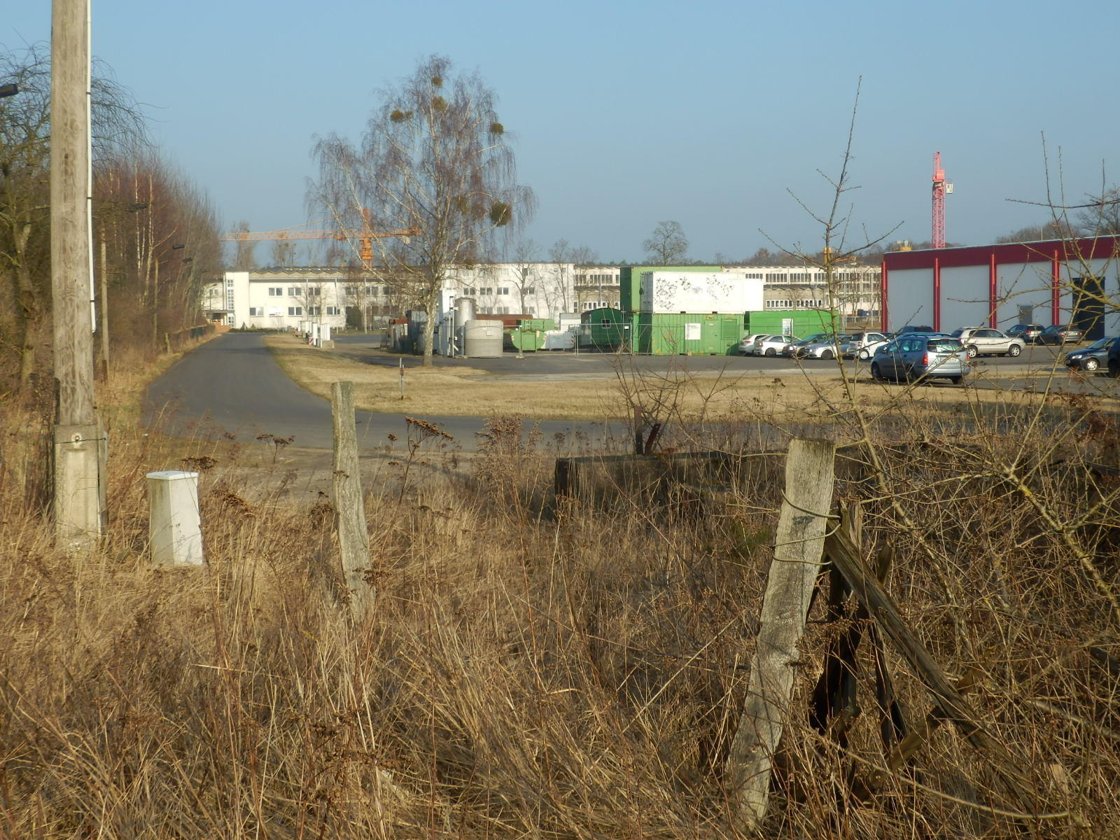 Gelände des ehemaligen KZ-Außenlagers in Velten, links im Bild die Straße "Zur Erinnerung", die damals als Weg vom Bahnhof (im Rücken des Fotografen) daran vorbeiführte